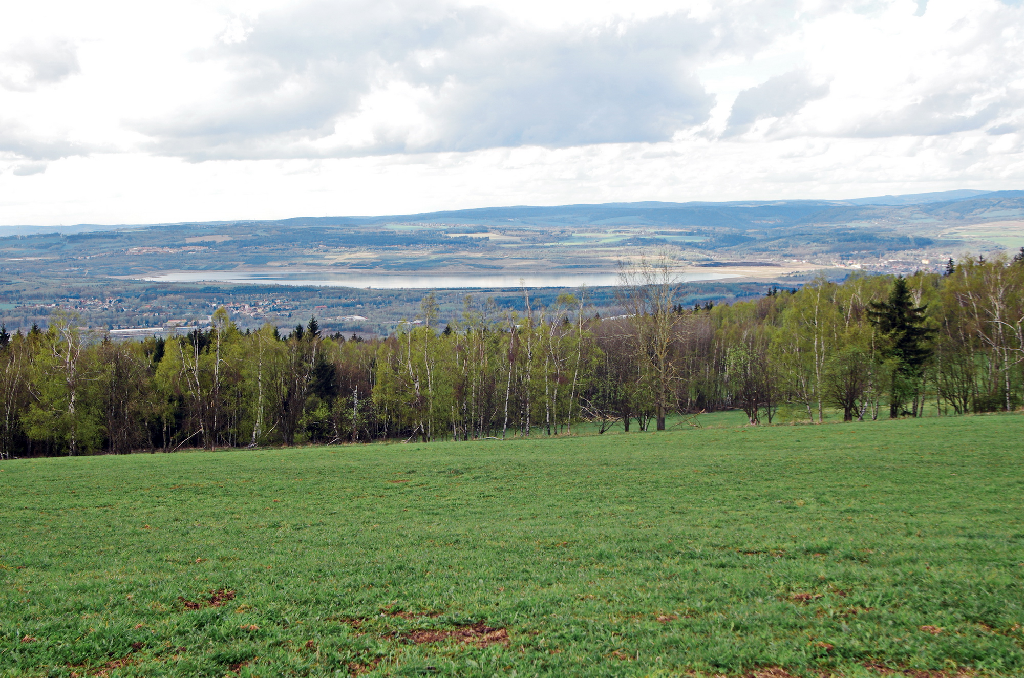 Sokolovská pánev, pohled na jezero Medard z Paseckého vrchu ve Slavkovském lese